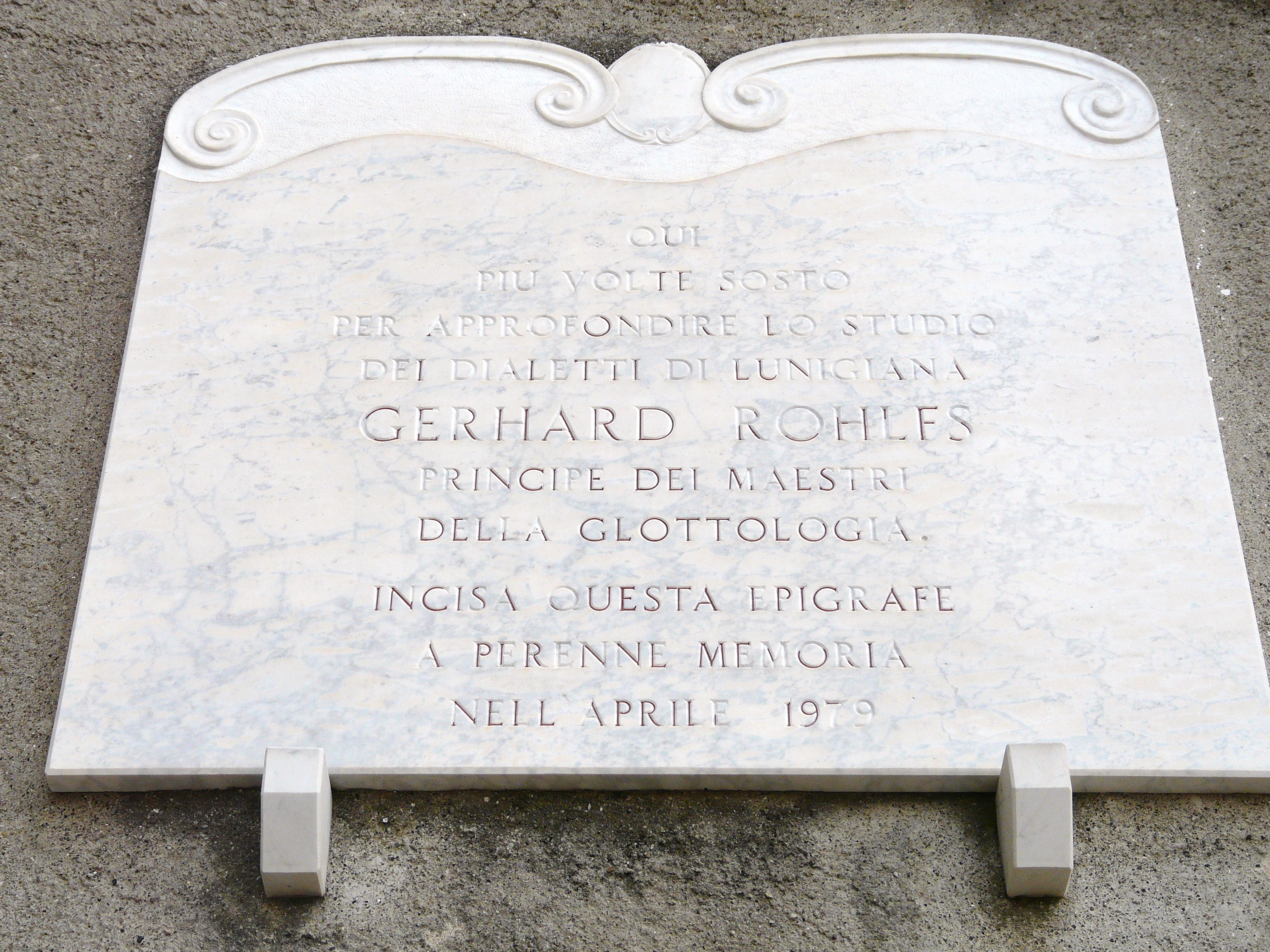 Bolano, Liguria, Italia